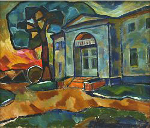 Алексей Моргунов. Кузьминки. 1911. Холст, масло. 91 x 105.5. Государственный музей искусств имени И. В. Савицкого